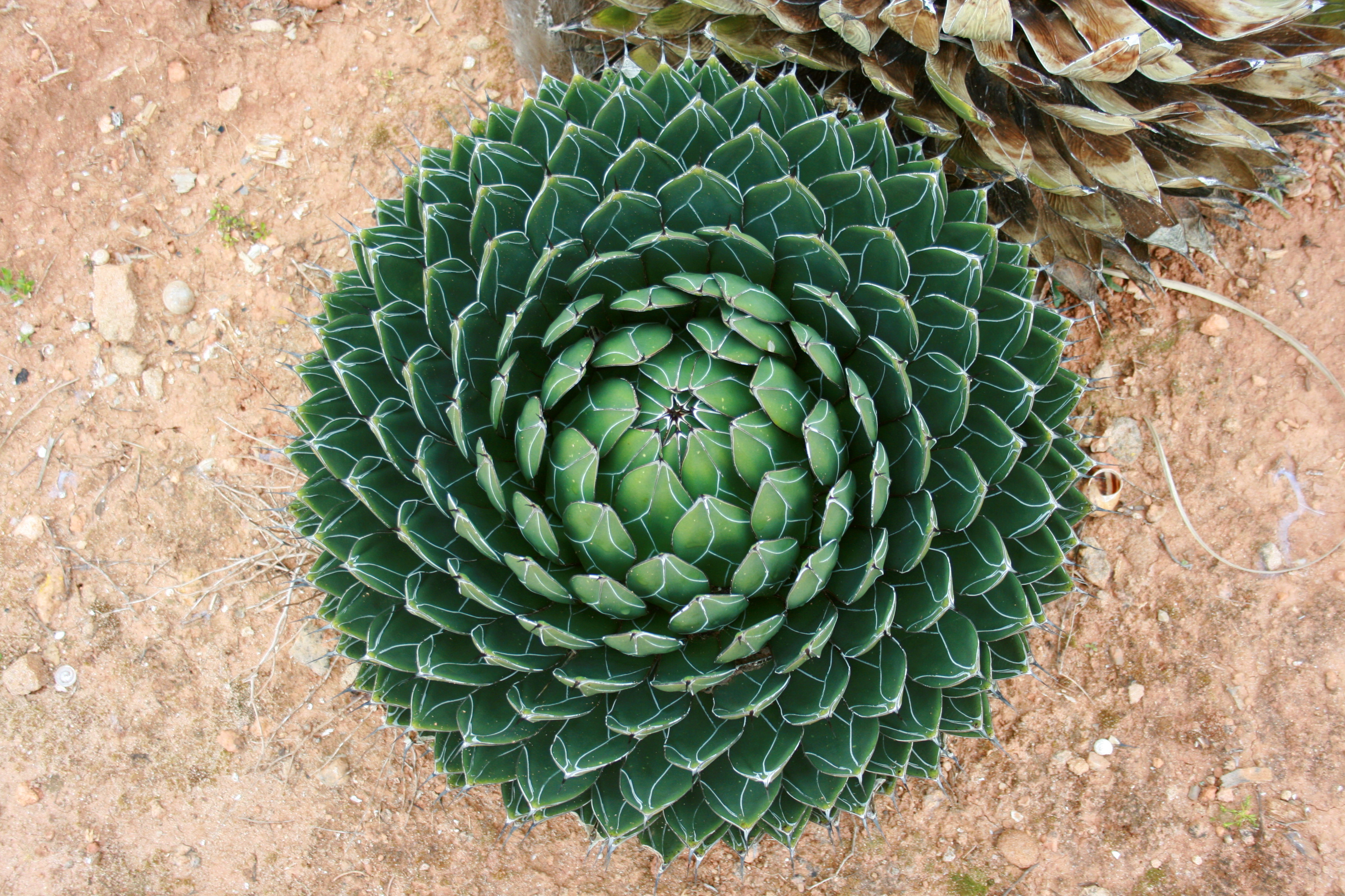 Botanicactus in Ses Salines, Mallorca, Spain